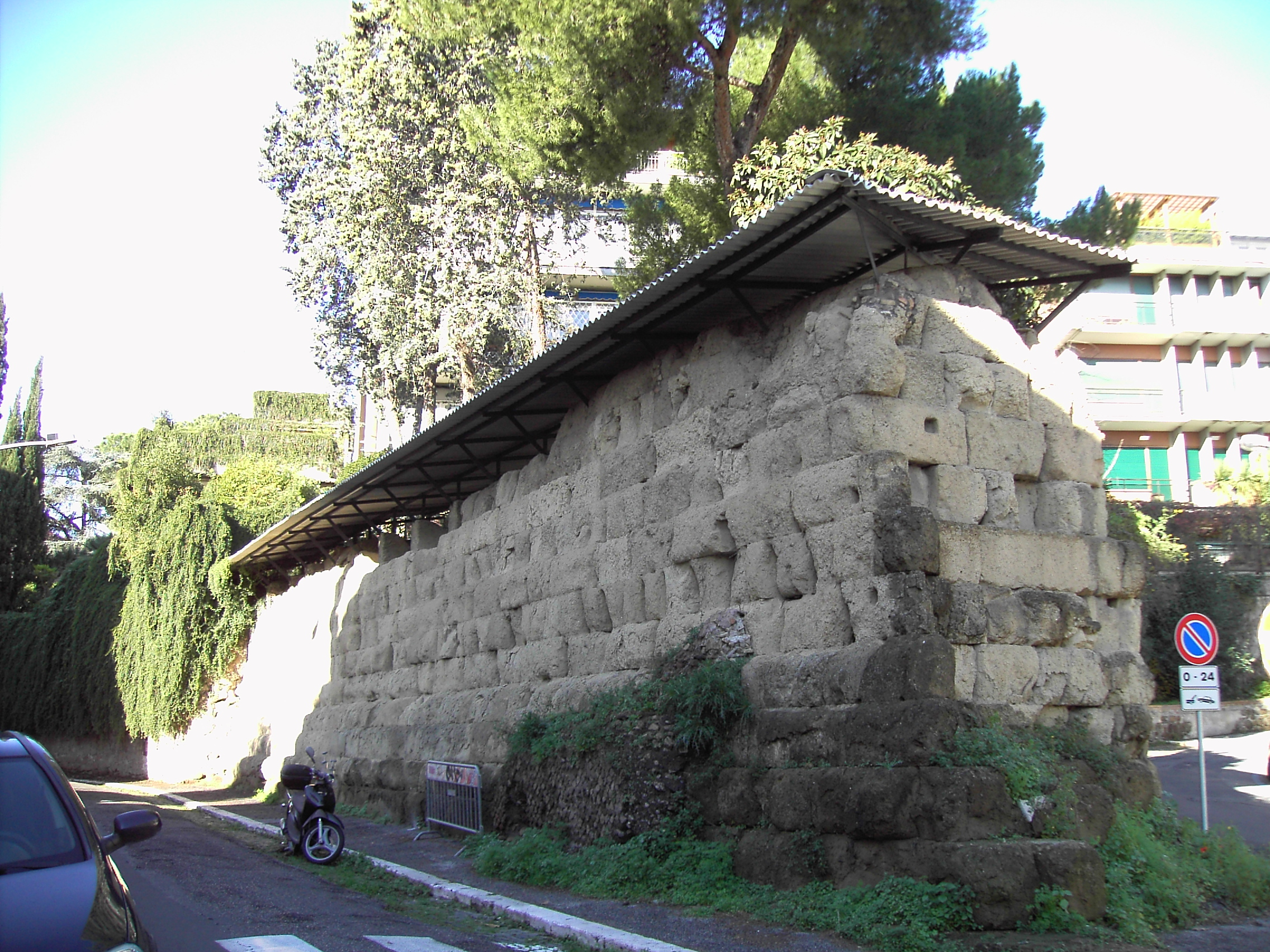 Roma, Mura serviane a via di Sant'Anselmo (Aventino)